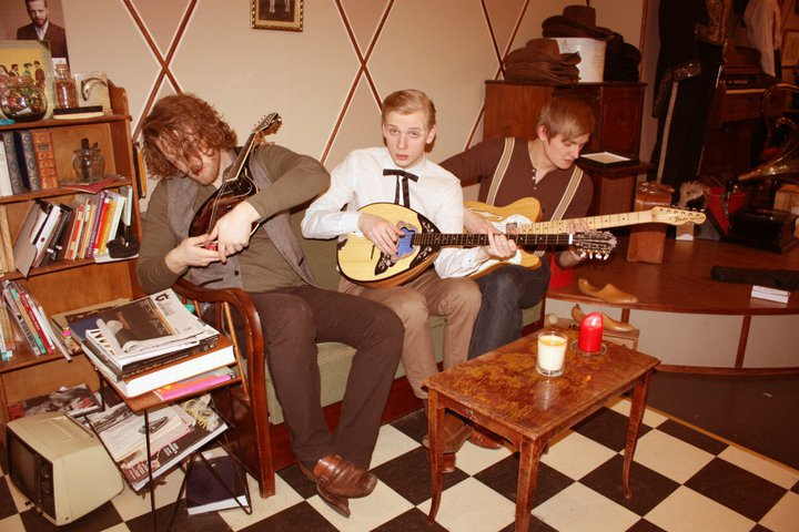 Mynd eftir Ástu Björk Jónsdóttir af hljómsveitinni 1860